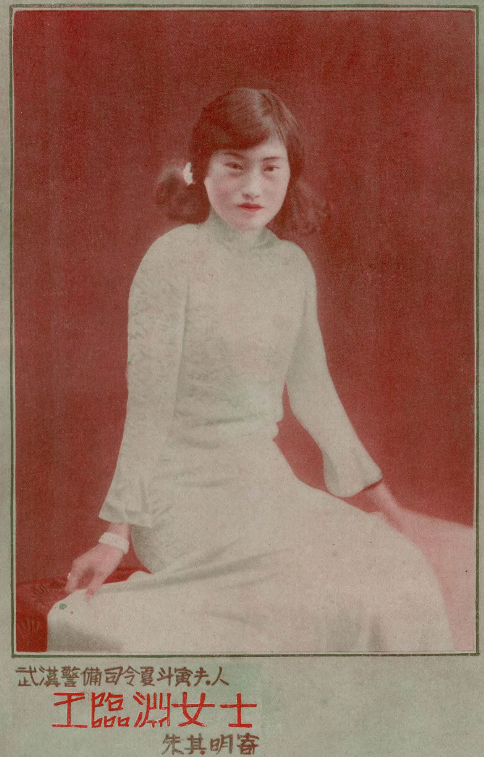 中文（台灣）: 武漢警備司令夏斗寅夫人王臨淵女士:[ 照片 ] 朱其明 《文華》 1931年[ 第26期 ，21頁]